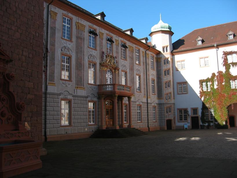 Ettlinger Schloß, Innenhof. Vor diesem Eingang steht im Sommer die Bühne der Schloßfestspiele, auch der Balkon gehört dann zur Bühne. Für die Zuschauer wird eine zum rechten Bildrand hin ansteigende Tribüne aufgestellt. Die Verzierungen an der Fassade sind größtenteils nur aufgemalt.